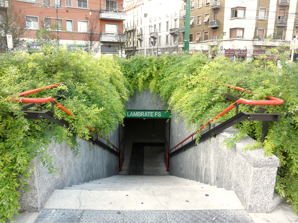 Scala di accesso alla stazione di Lambrate della metropolitana di Milano, in piazza Enrico Bottini.